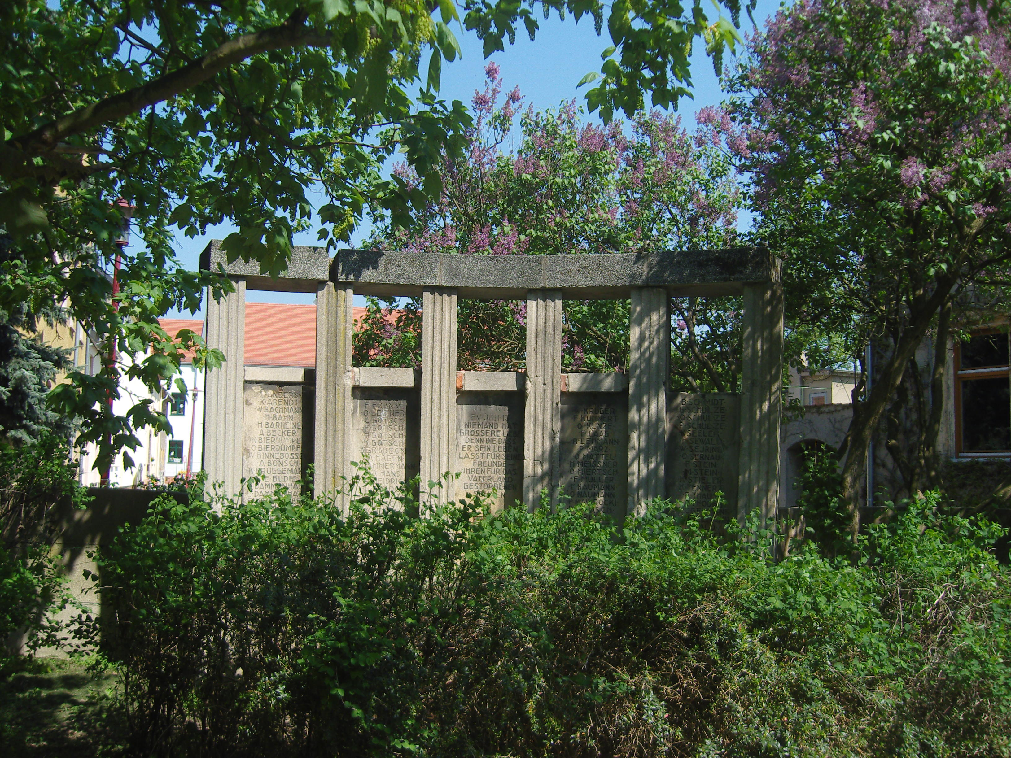 Kriegerdenkmal für die Gefallenen des Ersten Weltkriegs in Raguhn an der St. Georgskirche